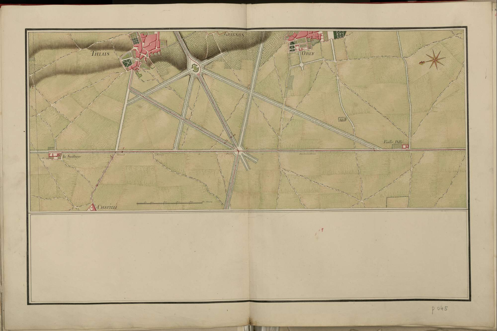 Atlas de Trudaine pour la généralité de Paris. "Sous-juridiction de Nemours. Généralité de Paris. Département de Fontainebleau n° III. Copie. Grande route de Paris à Lyon par Essonne, Fontainebleau et Nemours, depuis Paris jusqu'au gué de Turelle, fin de la généralité". Portion de route depuis "La-Saussaye" jusqu'à "Vieille-Poste" en longeant "Thiais", "Grignon" et "Orly".